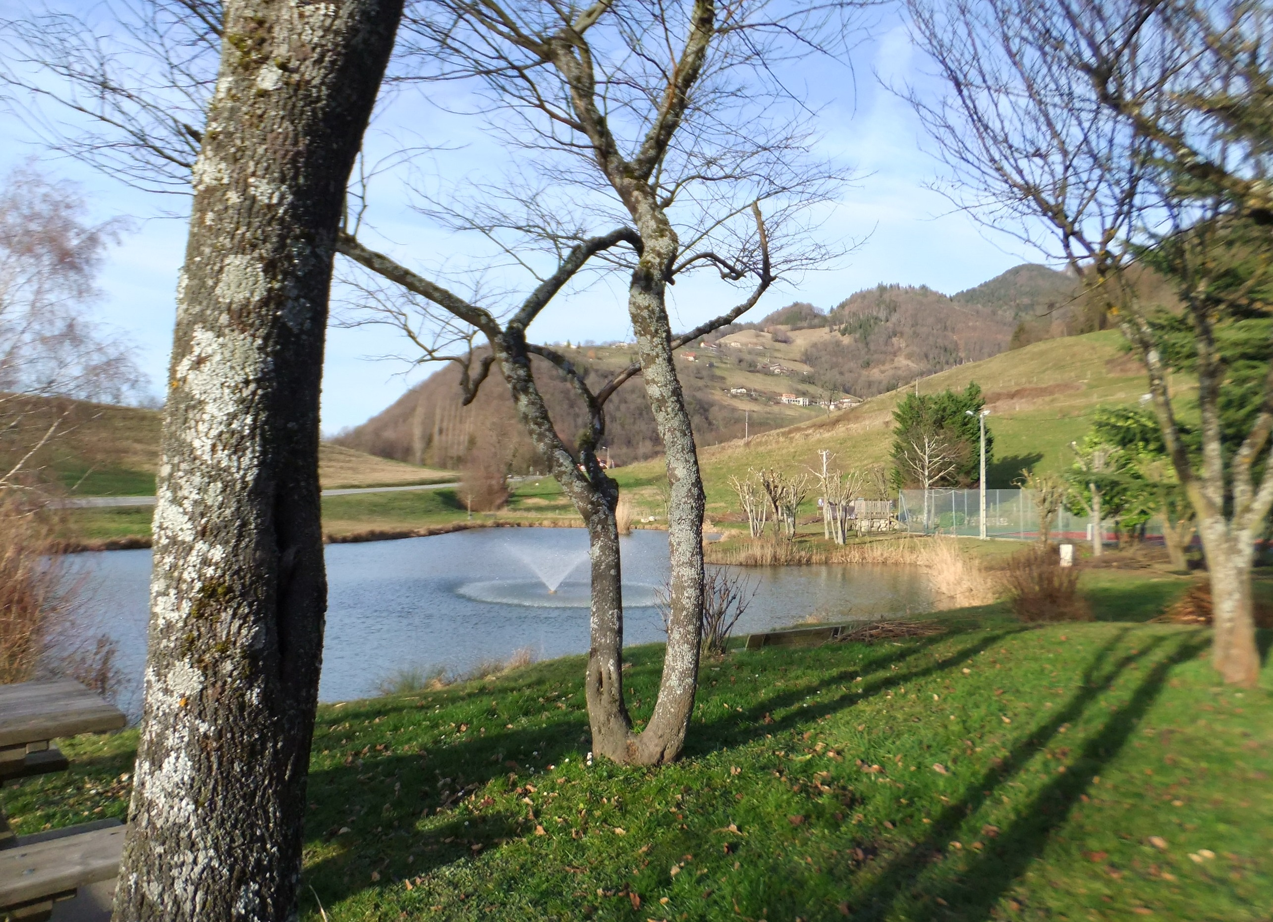 Le lac de la base de loisirs des Fontaines, hameau de la commune historique de Morêtel-de-Mailles.